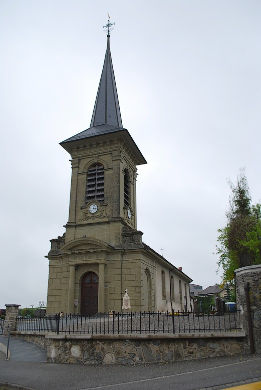 Vue extérieure de l'église d'Arconciel (fin XVIIIème siècle)